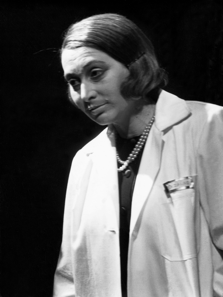 Friedrich Dürrenmatt, Fiziki, Drama SNG v Ljubljani. Na fotografiji: Stefka Drolc (Gospa dr. von Zahnd).